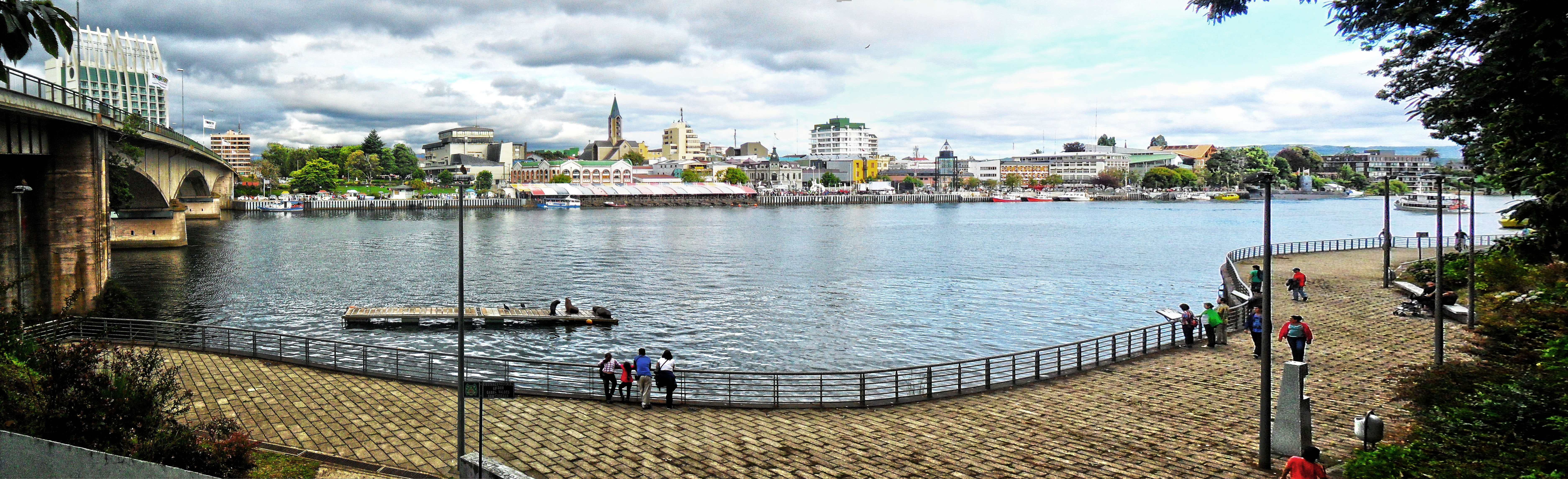 Costanera fluvial en río Valdivia. A la izquierda, puente Valdivia; de fondo, feria fluvia, mercado y torre de iglesia.